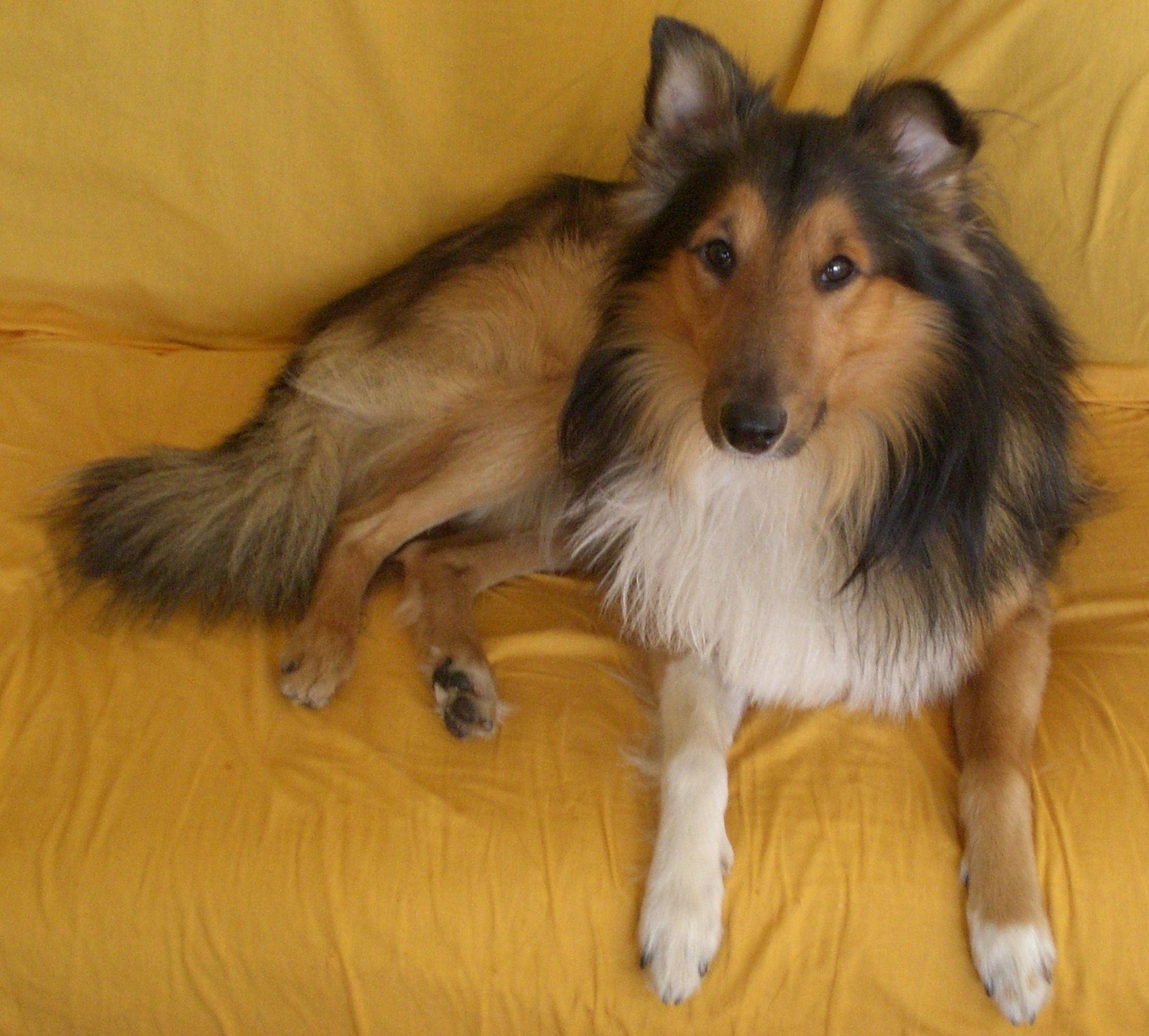 Tink (geb. febr. 2005)